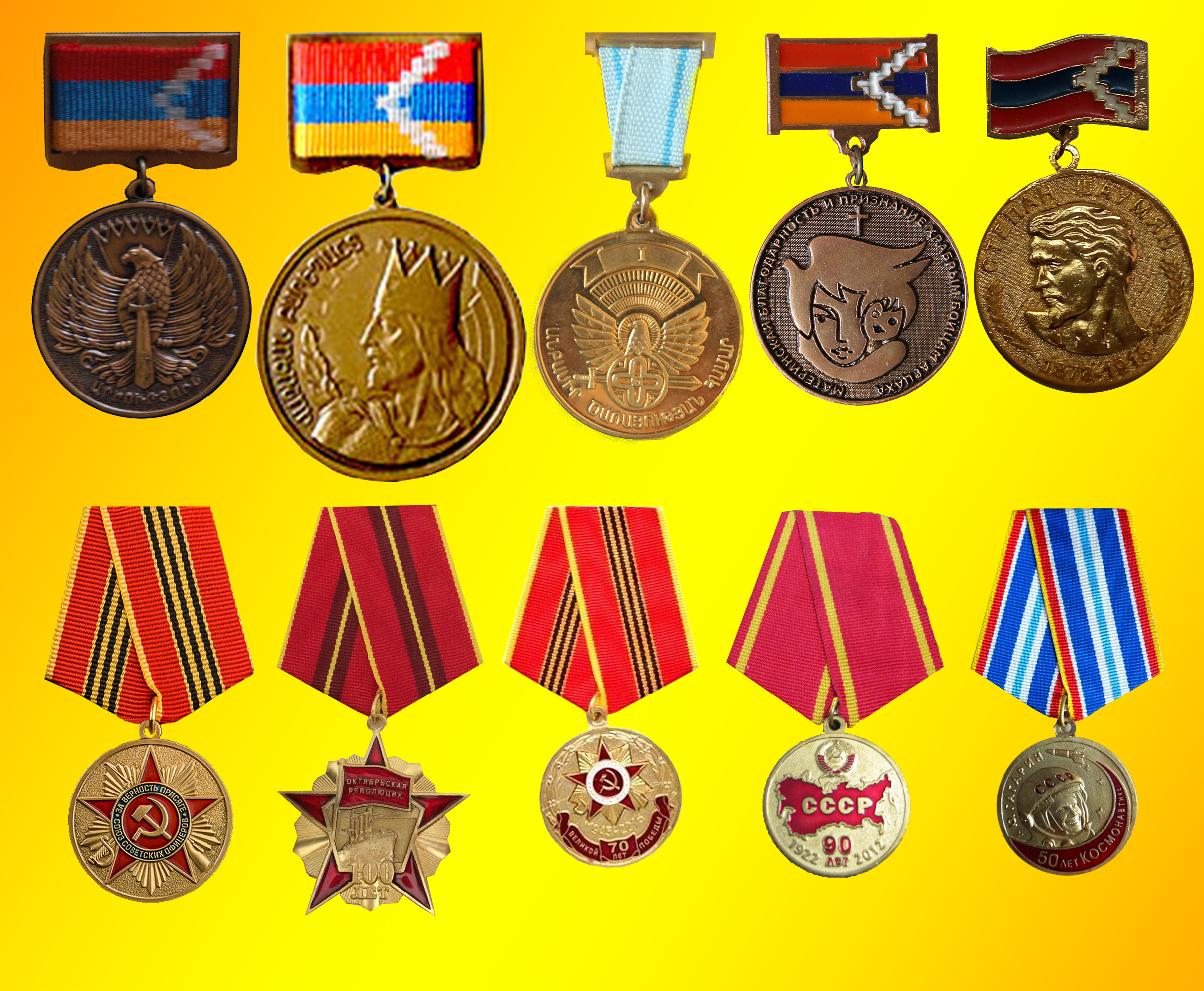 medalner